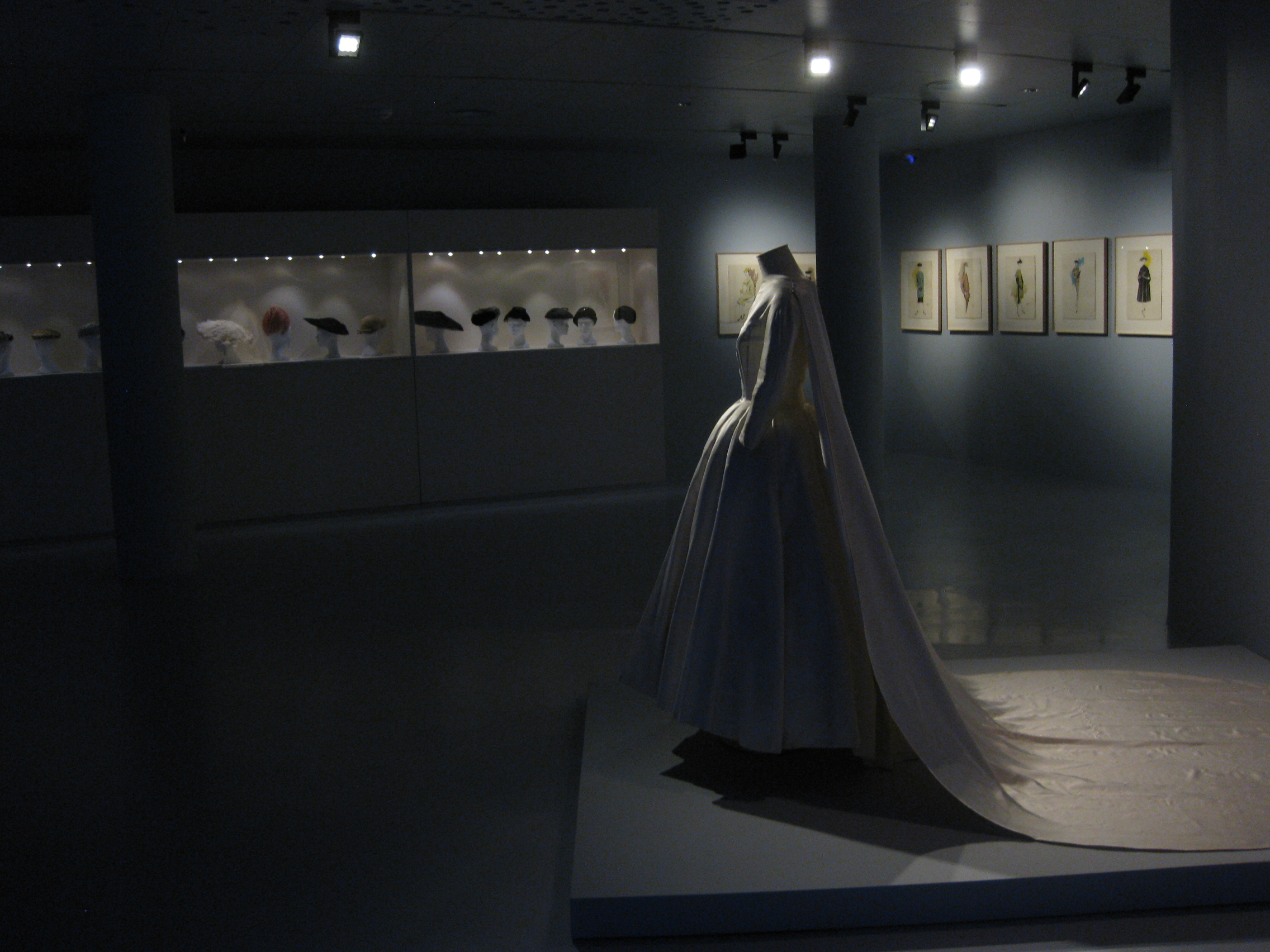 Exposició Balenciaga y la alta costura en Barcelona, proximidades y distancias. Col·lecció tèxtil Antoni de Montpalau